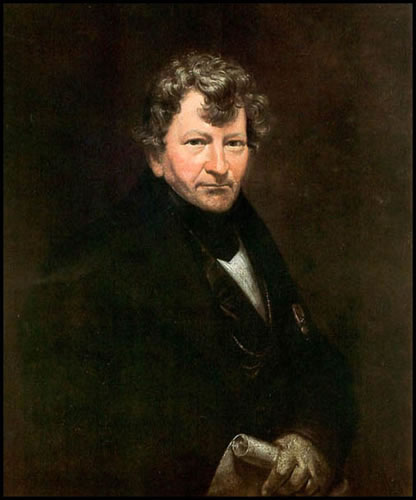 Muller, Auguste. Gradjean de Montigny, c. 1843, MN Belas Artes